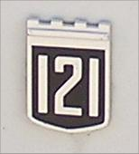 Objekt: Volvo 121 Weiß